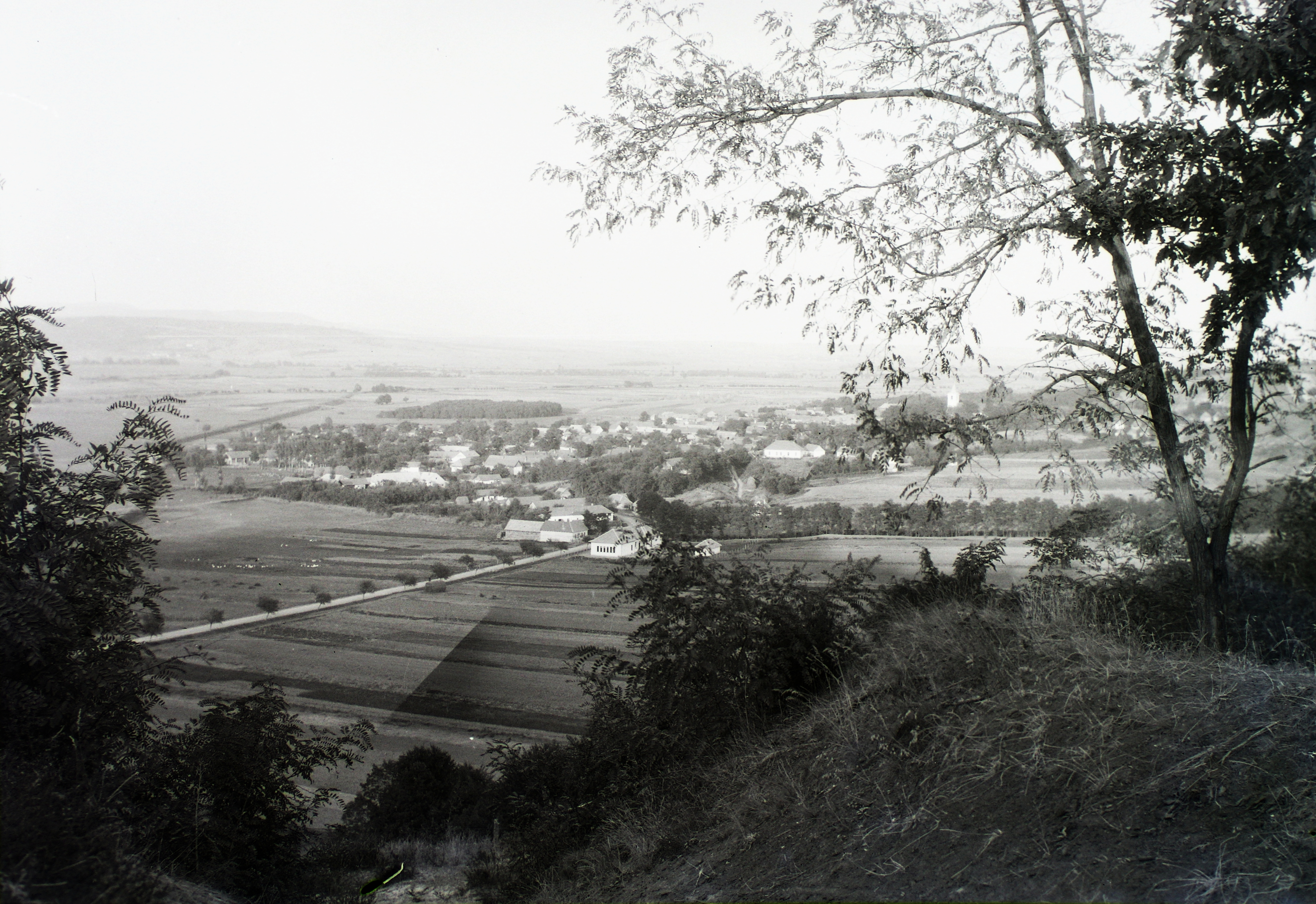 a település látképe, jobbra a faágak között a Csitári kegyhely kápolnája látszik. Location: Hungary, Hont Title: a település látképe, jobbra a faágak között a Csitári kegyhely kápolnája látszik.